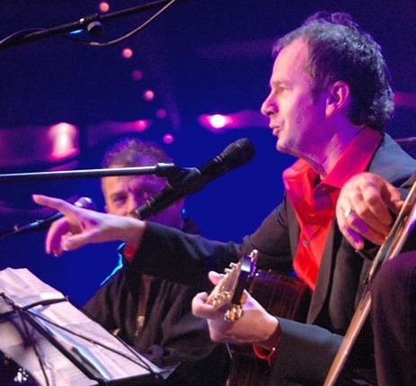 Willi Astor als Gast beim 30. Jubiläum der Spider Murphy Gang im Münchner Zirkus Krone 2008